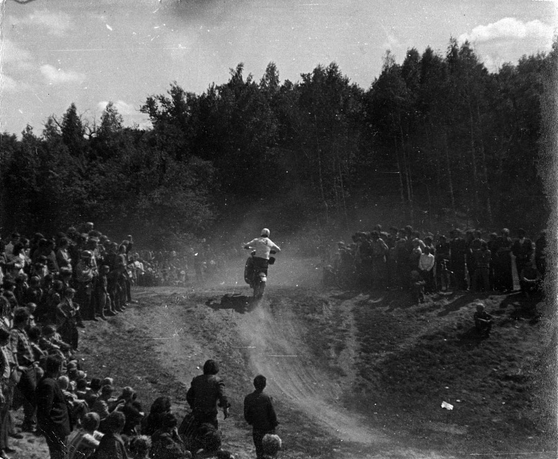 Мотокросс в Скопине (старая трасса)